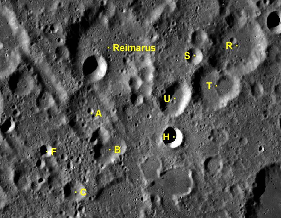 Cráter lunar Reimarus. Cráteres satélite. (Imagen LRO)